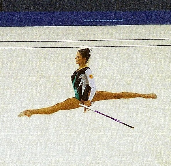 La gimnasta española Carolina Pascual durante el ejercicio de aro en el Campeonato Mundial de Gimnasia Rítmica de 1993, celebrado en Alicante.